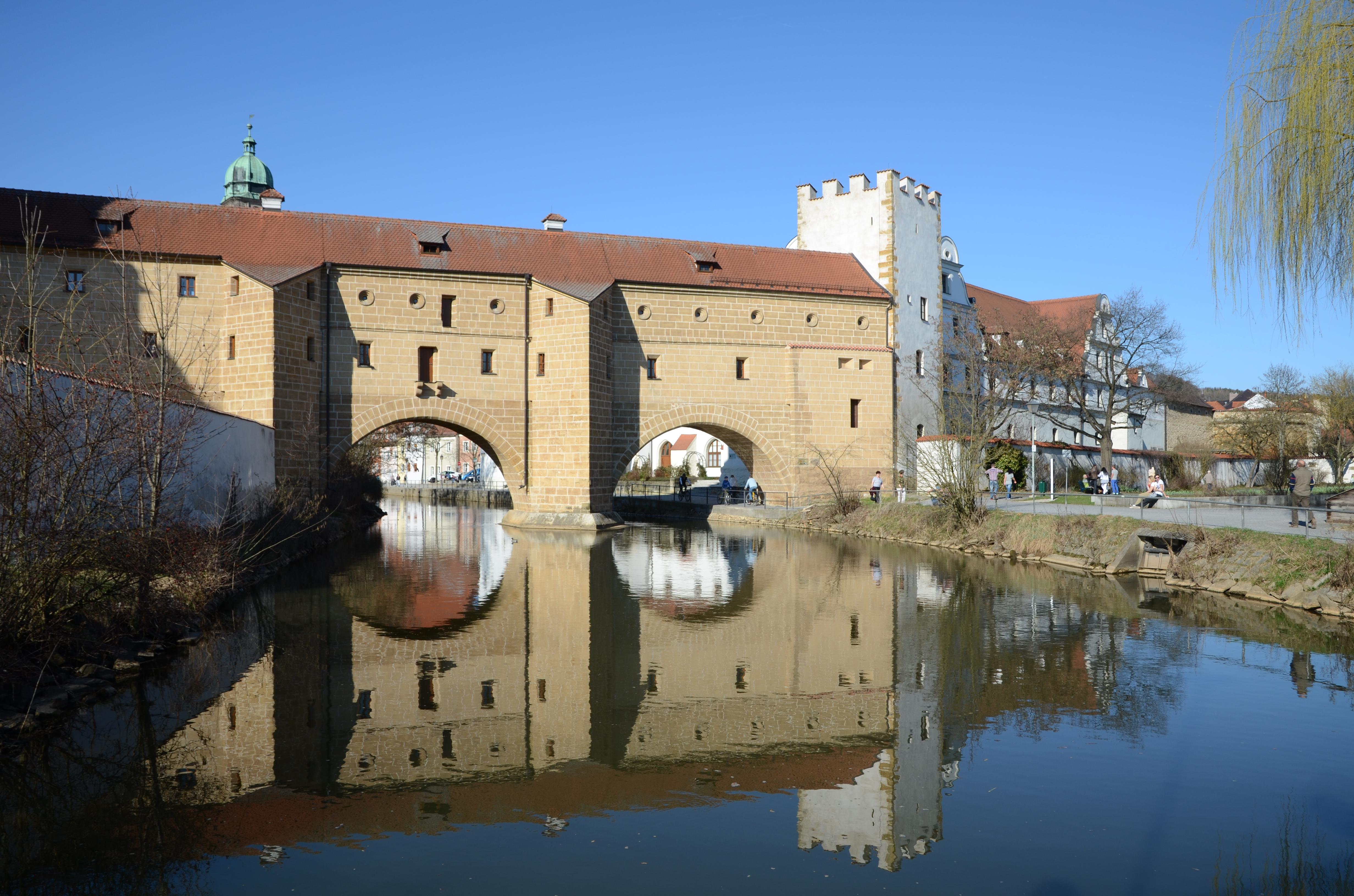 Amberg ehem. kurfürstliches Zeughaus (rechts), Teil der Stadbefestigung, sog. Stadtbrille (links)This is a photograph of an architectural monument. is a photograph of an architectural monument.